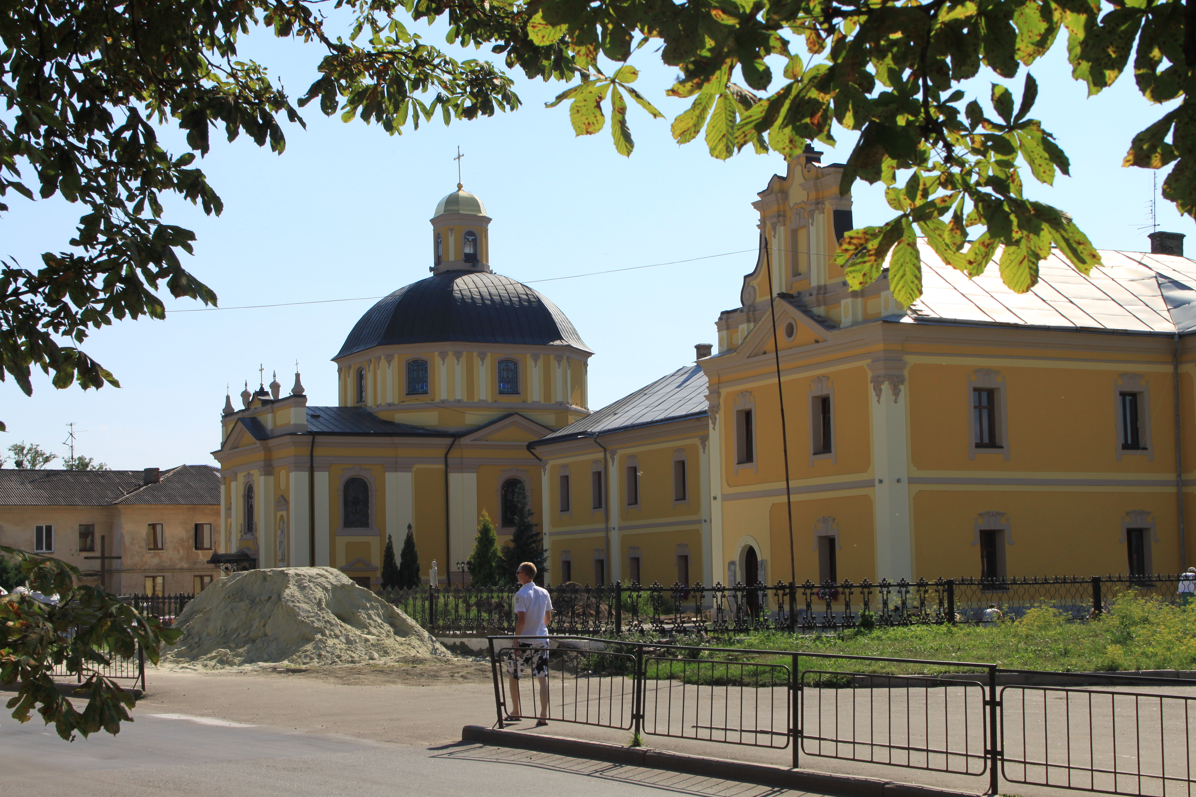 Загальний вид